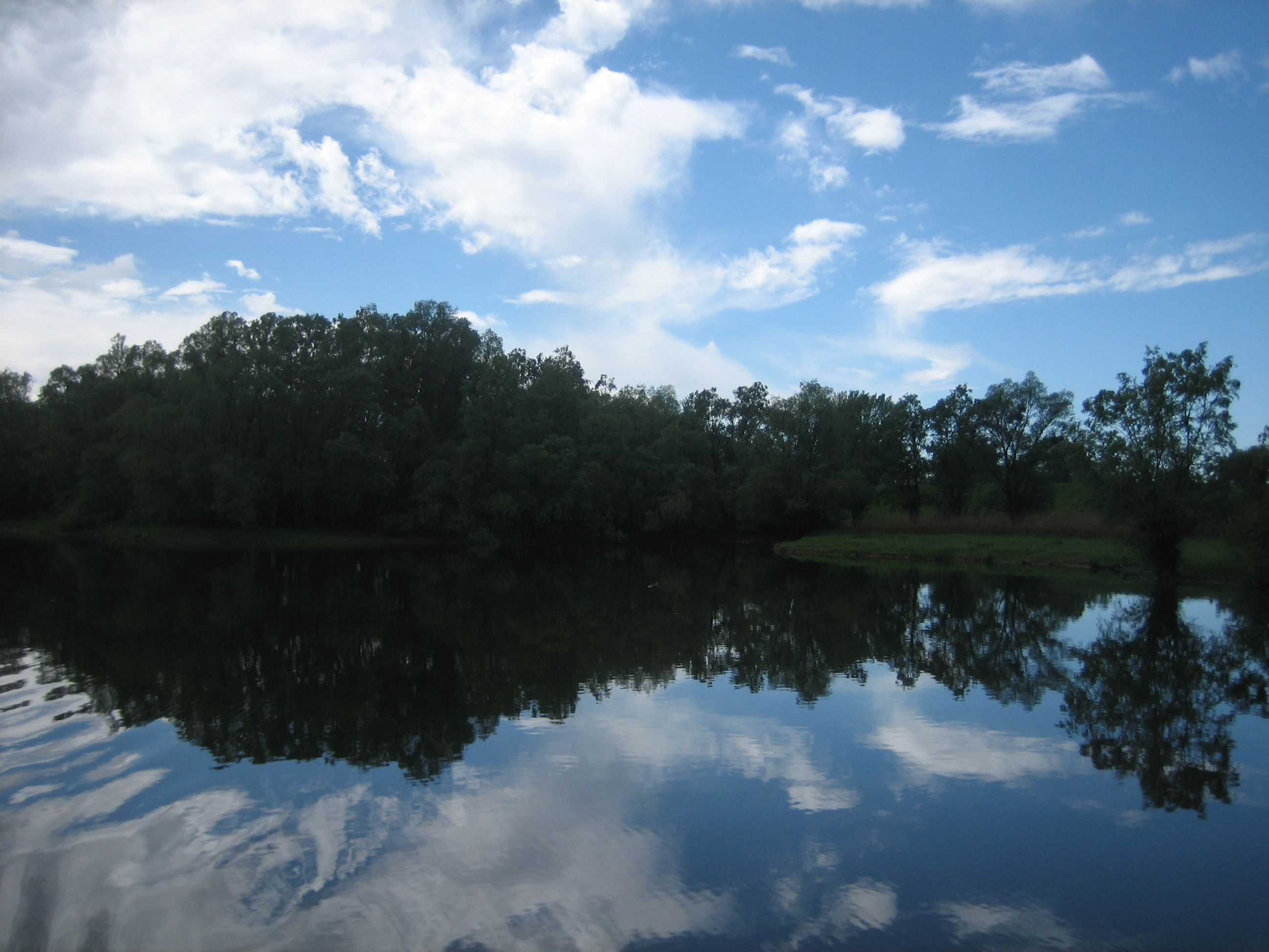 Kopački rit, a nature park in Baranja, eastern Croatia / Park prirode Kopački rit u Baranji.